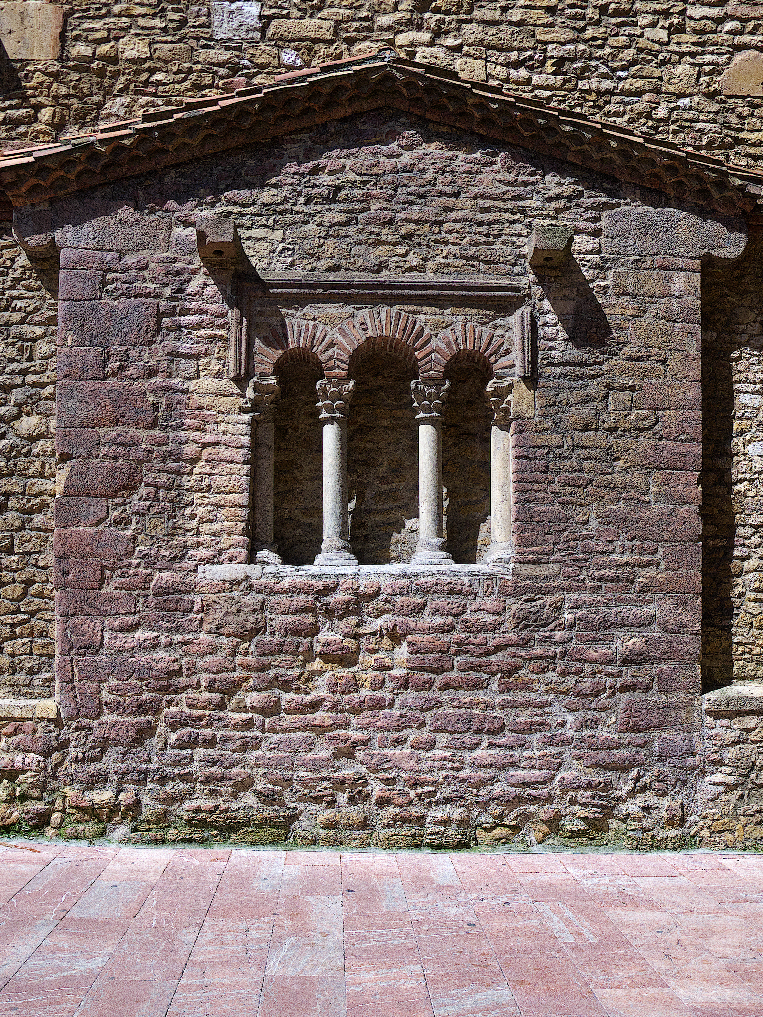 Ventana trigeminada, muy bien conservada, testigo de la antigua Iglesia de San Tirso el Real (s. IX), mandada a construir por Alfonso II de Asturias, el Casto. Representa una de las pocas obras del arte prerrománico asturiano existente en la capital de Oviedo.